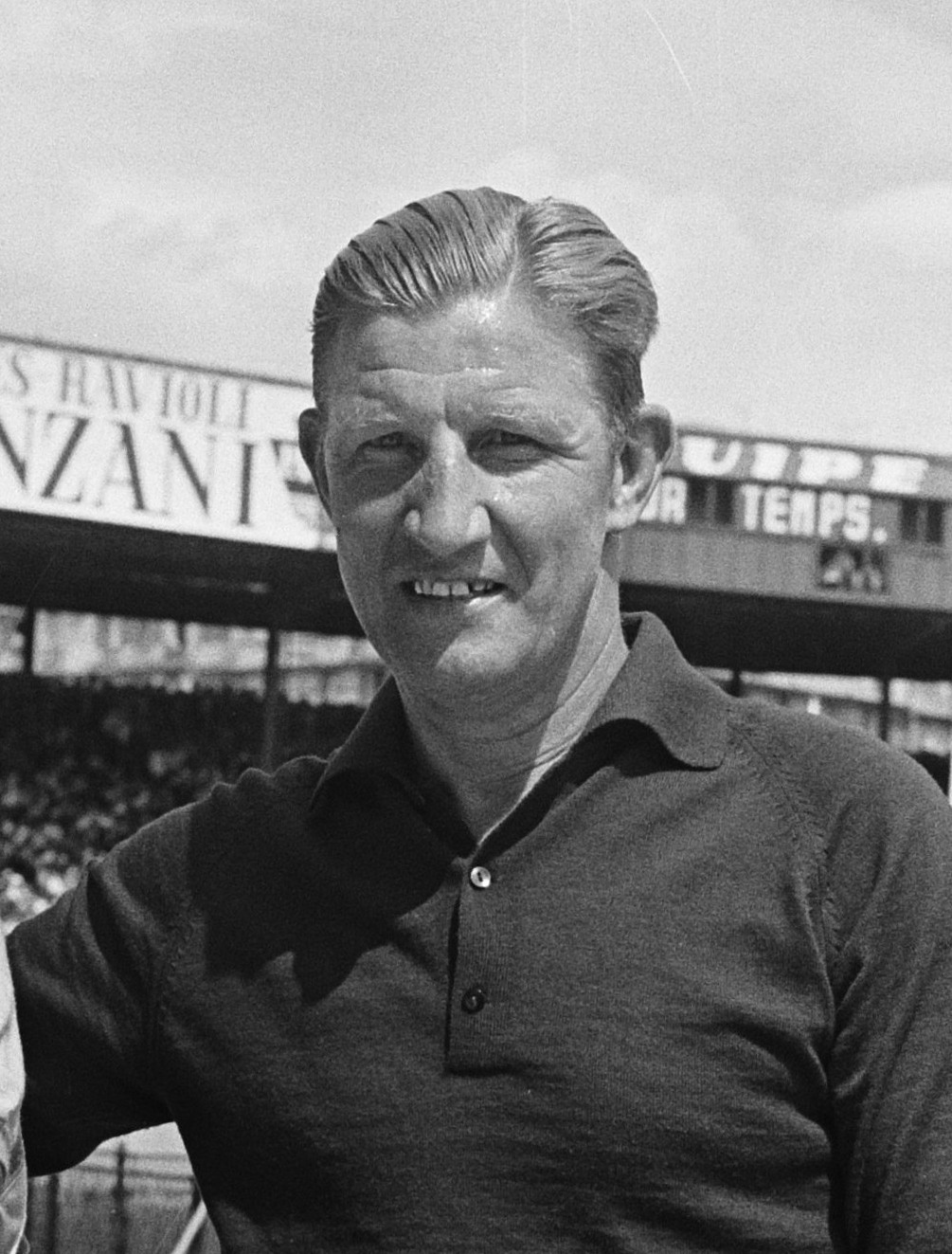 Tour de l'Avenir aankomst in Parijs. Gerrit Schulte